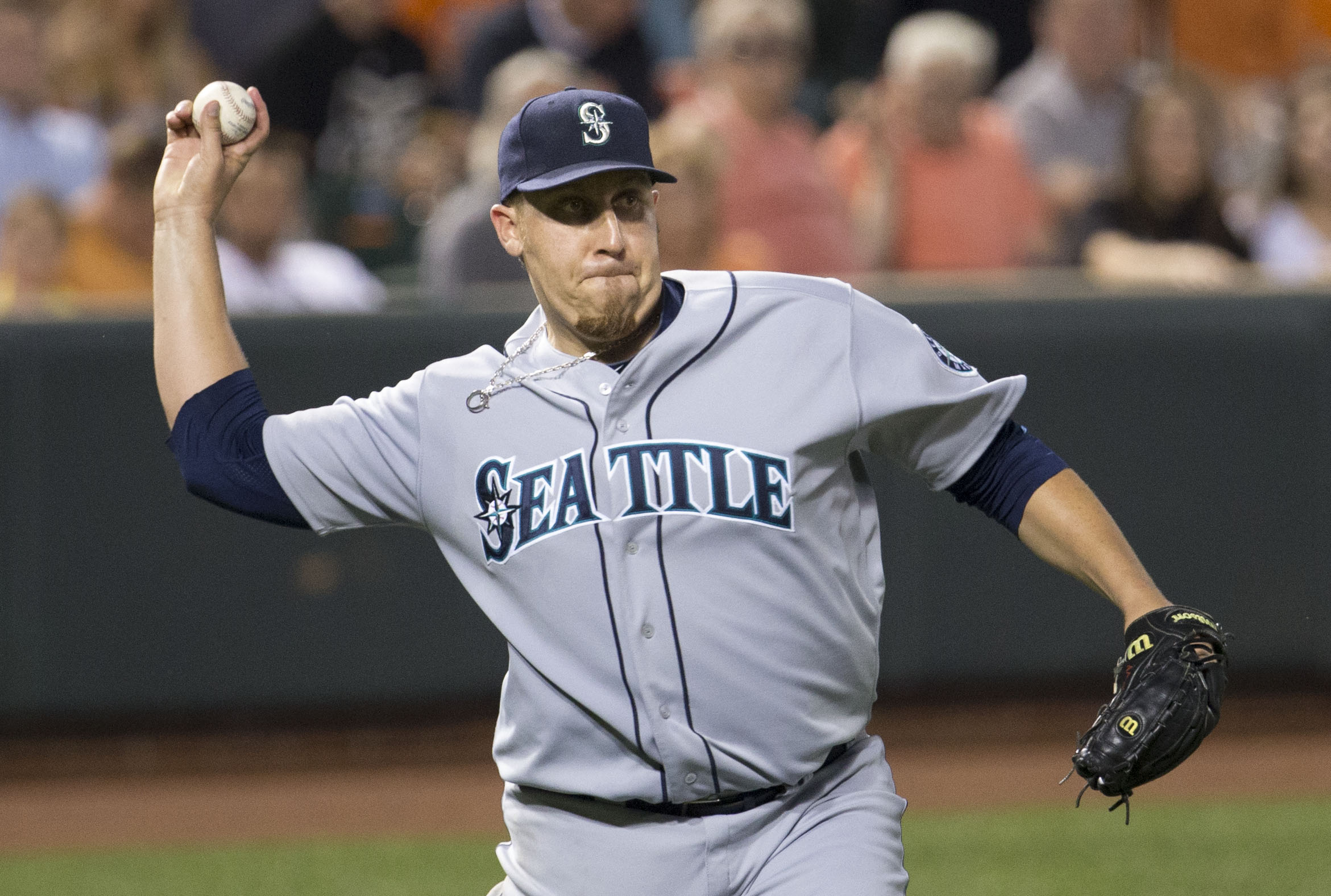 Aaron Harang